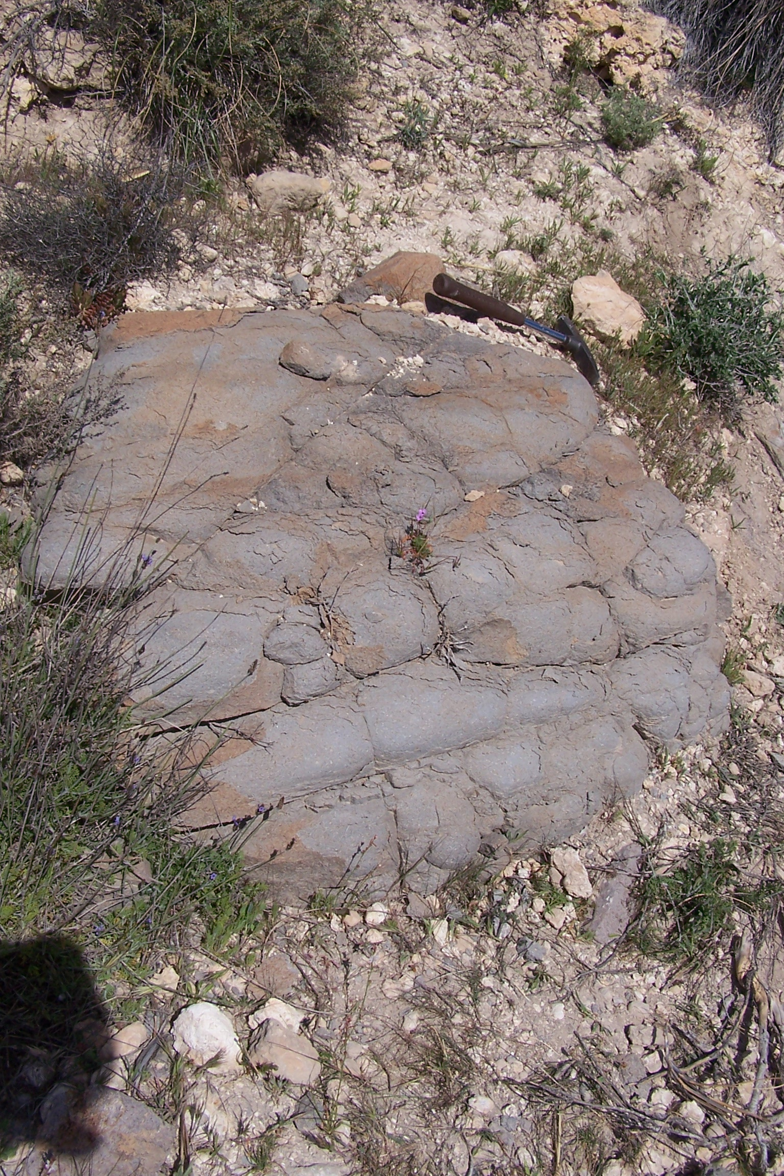 Eigen werk, 13-03-2006